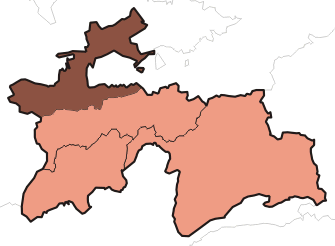 Viloyati Sughd